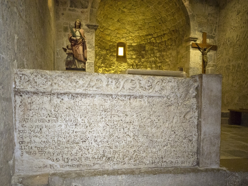 Crkva sv. Lucije u Jurandvoru